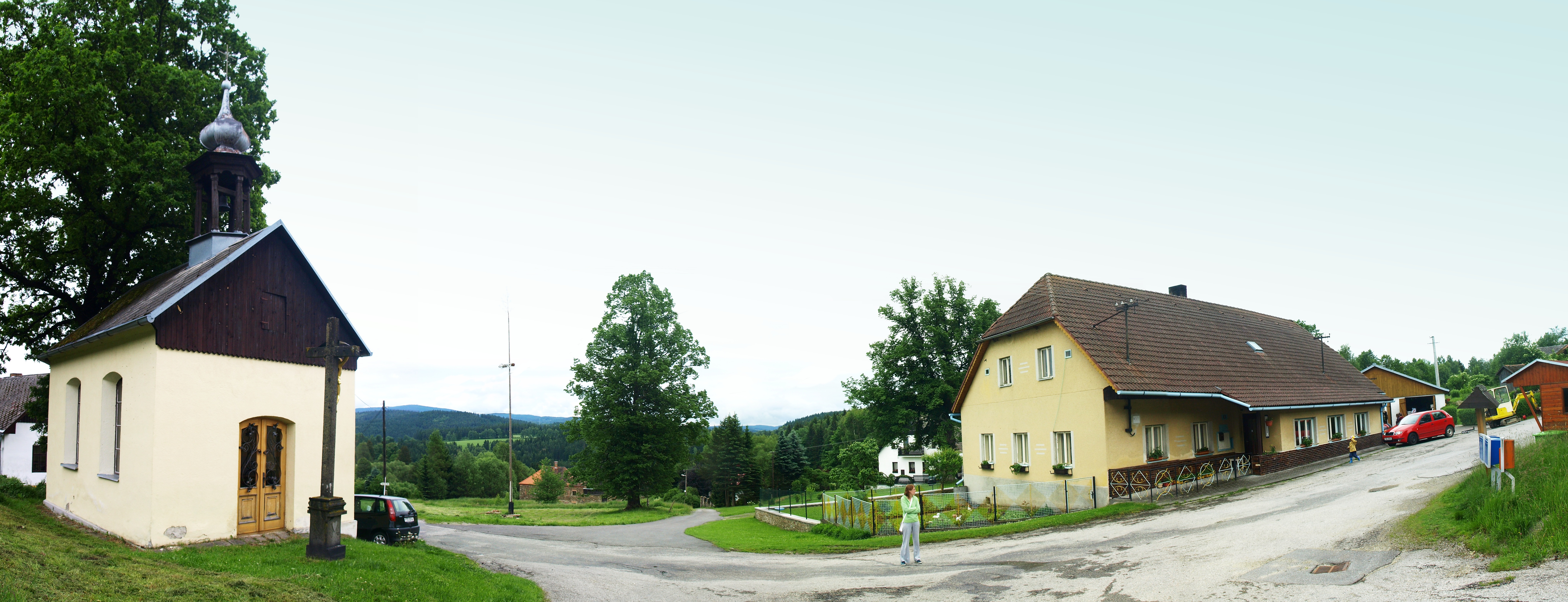 Mlynářovice - náves